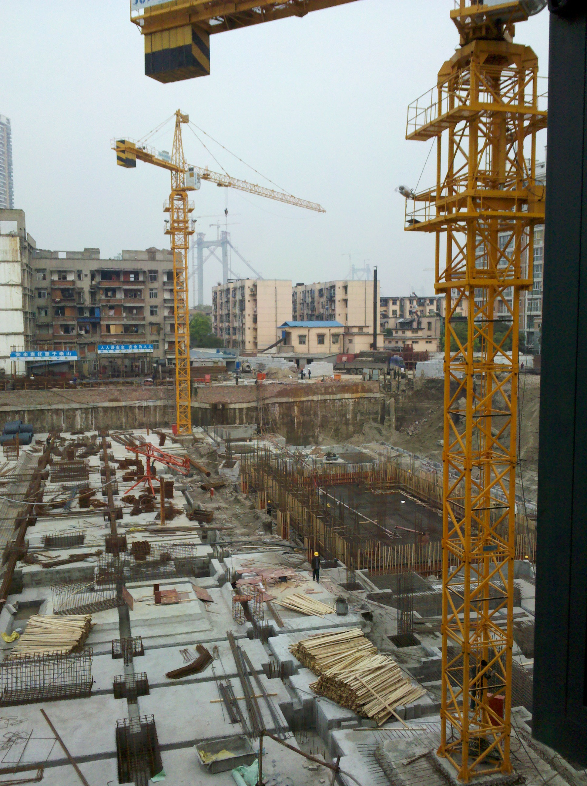 Hanyang, Wuhan, Hubei, China